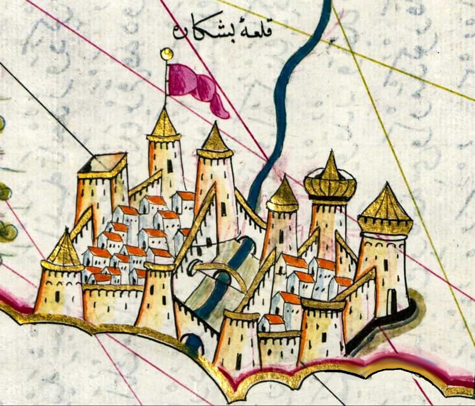 Mappa Piri Reis 1525 Pescara